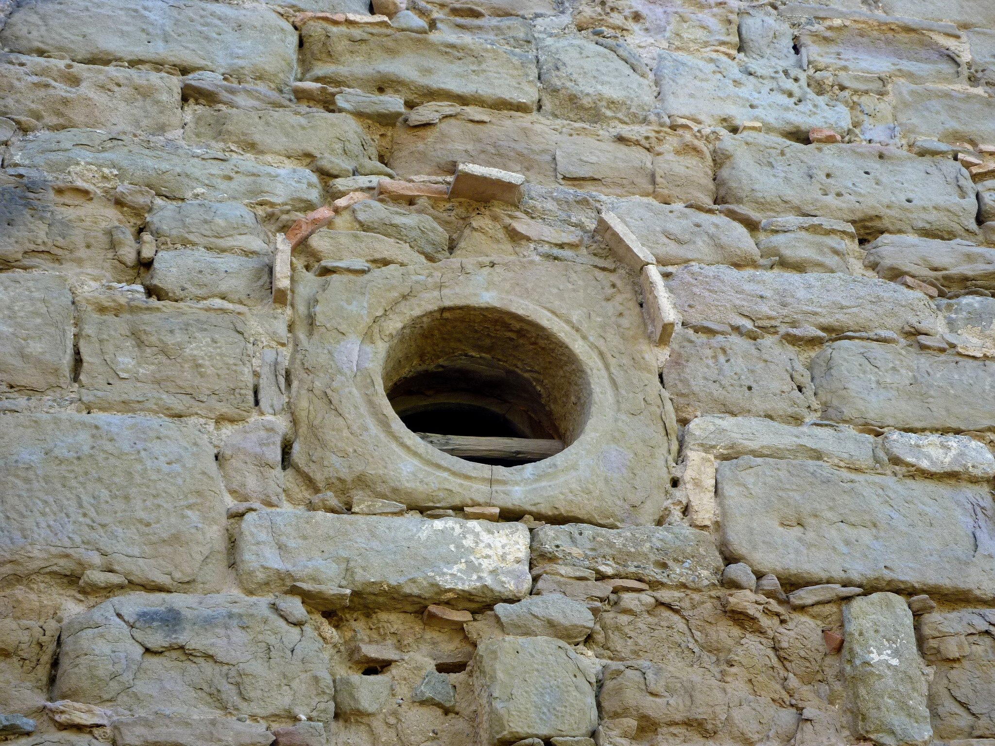 Església de Sant Jaume de Peà (Navès): òcul monobloc